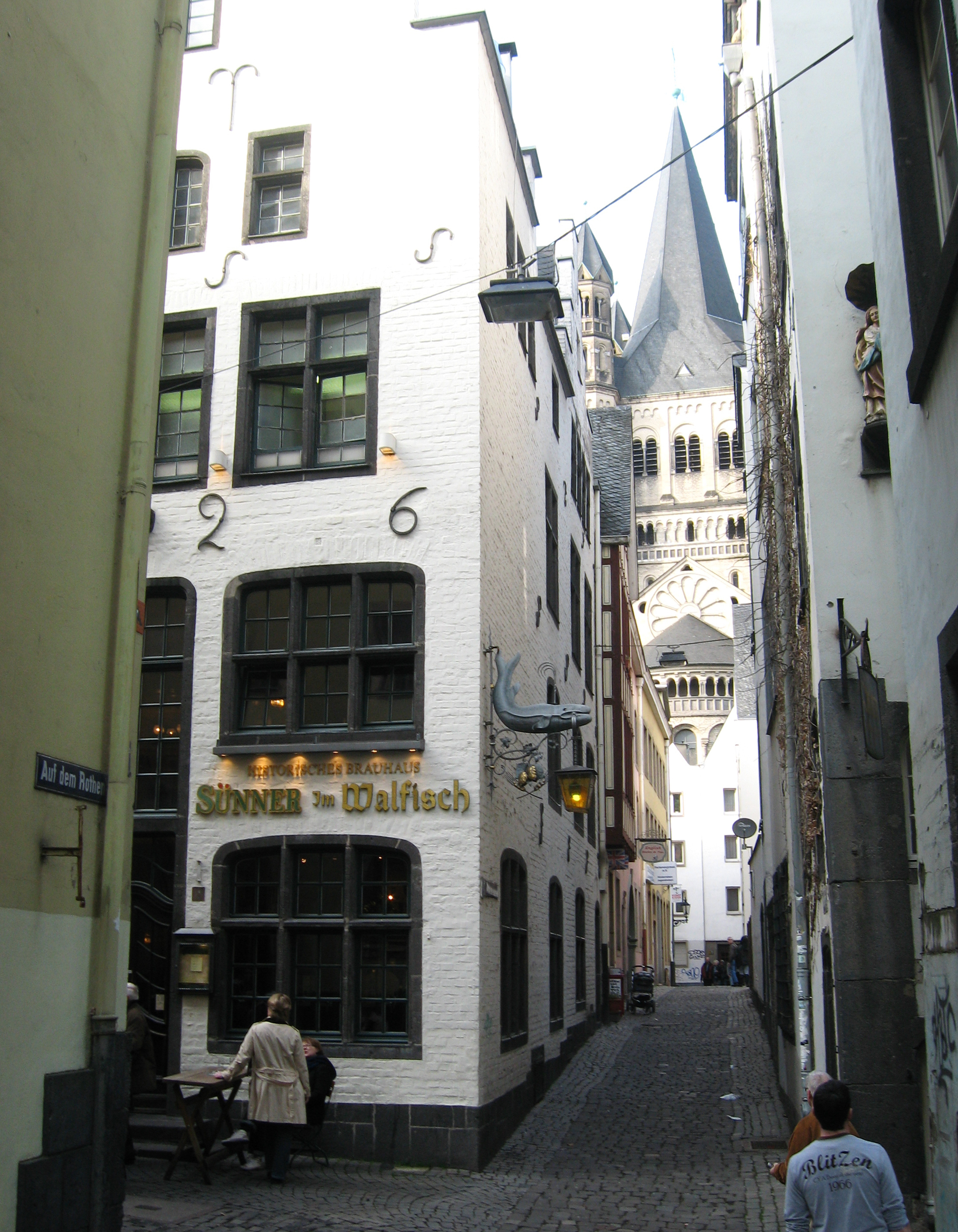 Brauhaus Sünner im Walfisch (Köln, Altstadt) Datum: 12.03.2011 Urheber: M. Pfeiffer alias Benutzer:Gordito1869 privates Fotoarchiv des Urhebers